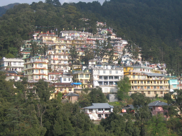 Maisons à Mcleod Ganj-House in Mc Leod Ganj-Domaro en McLeod Ganj